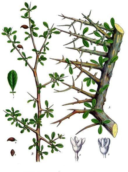 Myrrhe. A Theil eines beblätterten Astes in natürl. Grösse; B Zweigende mit Früchten, desgl.; 1 Blatt, vergrössert; 2 männliche Blüthe von Bals. Ehrenbergianum, nach Berg, desgl.; 3 weibliche Blüthe derselben Art, gleichfalls nach Berg, desgl.; 4 und 5 Frucht, natürl. Grösse.